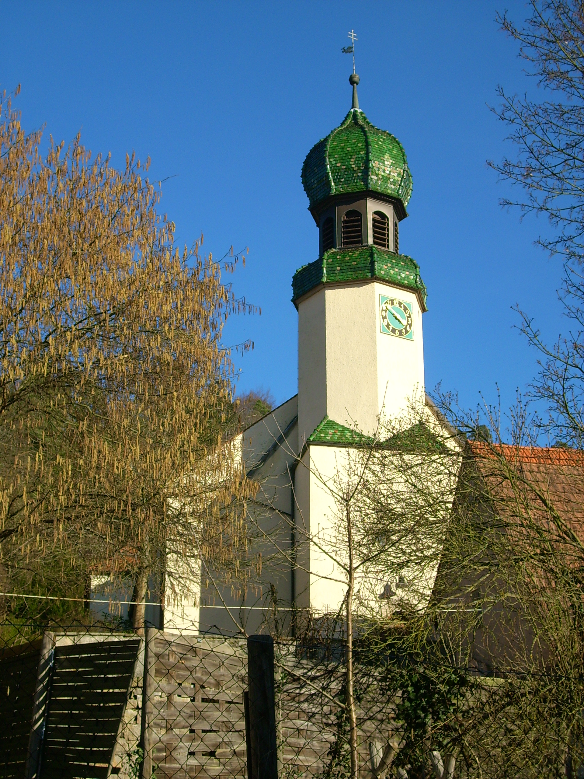 Kirche in Bad Niedernau (Ortsteil von Rottenburg), Deutschland